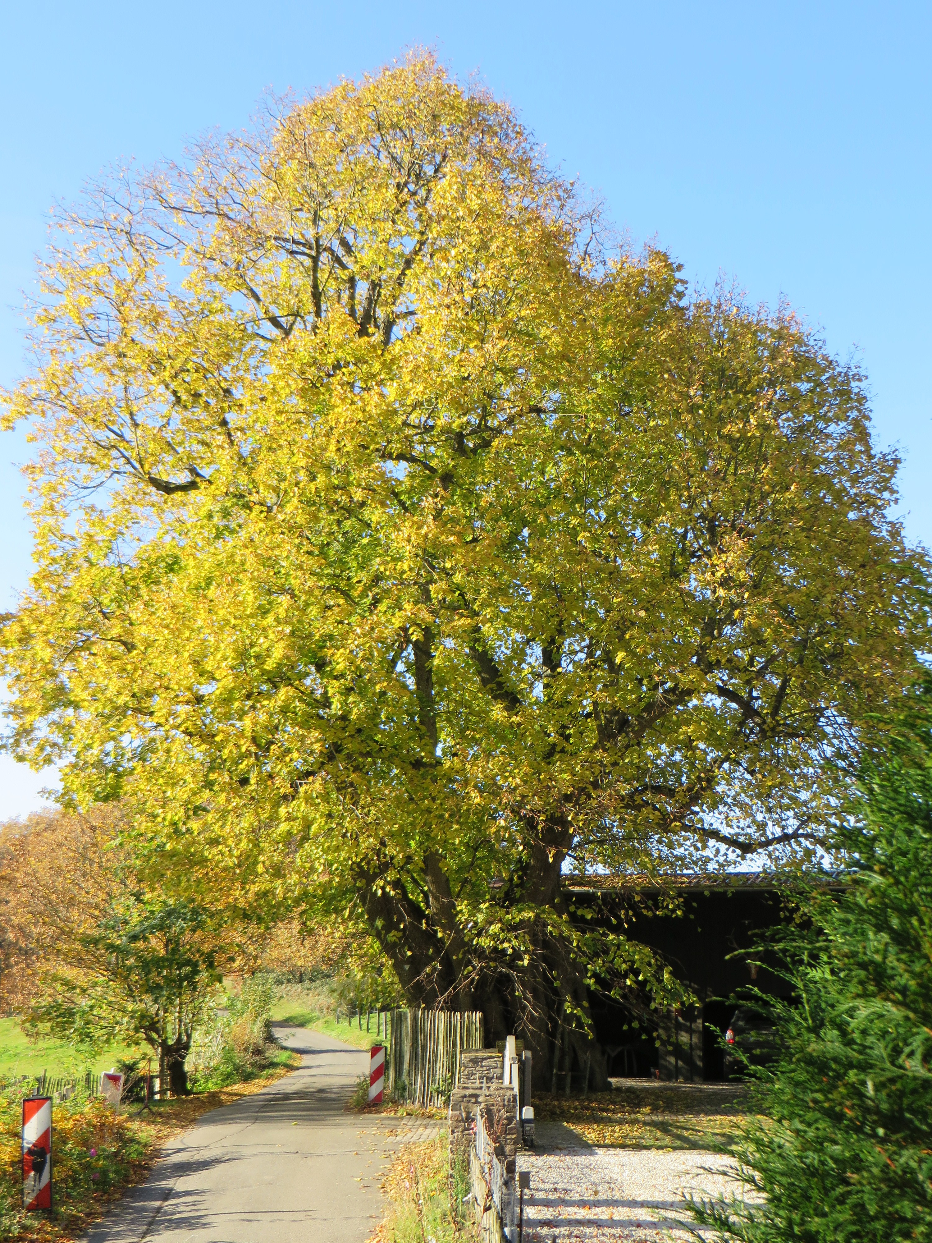 „Tausendjährige Femelinde“ in Herbstfärbung in der Hoffläche von Haus Schröder in Rumscheid, Hagen-Dahl. Eine als Naturdenkmal 1.3.2.1.52 geschützte Sommerlinde (Tilia platyphyllos), Stammumfang ca. 8,60 m, Kronendurchmesser ca. 22 m, Höhe ca. 25 m. Vor vielen Hundert Jahren von einem Blitzschlag zerteilt und zu einem skurrilen Giganten gewachsen. Die Teilstücke des ausgehöhlten Stammes bilden inzwischen eigene Stämmlinge, die durch überwallende Rinde und Adventivwurzeln gekennzeichnet sind. Rumscheid wurde schon 1050 als Rumenscetha erstmals erwähnt und ist damit der älteste dauerhaft besiedelte Wohnplatz auf Hagener Gebiet.